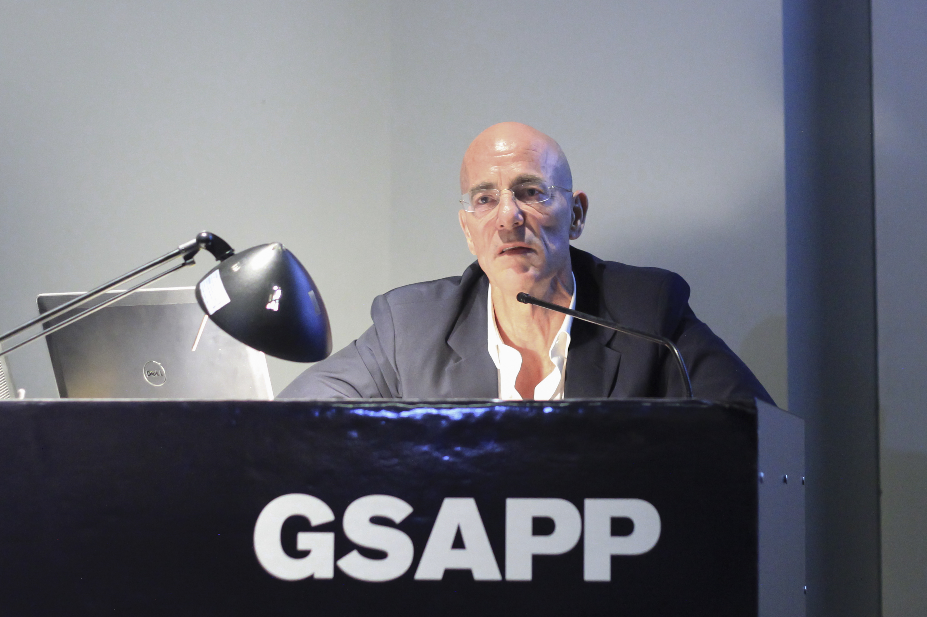 Lecture by Jacques Herzog